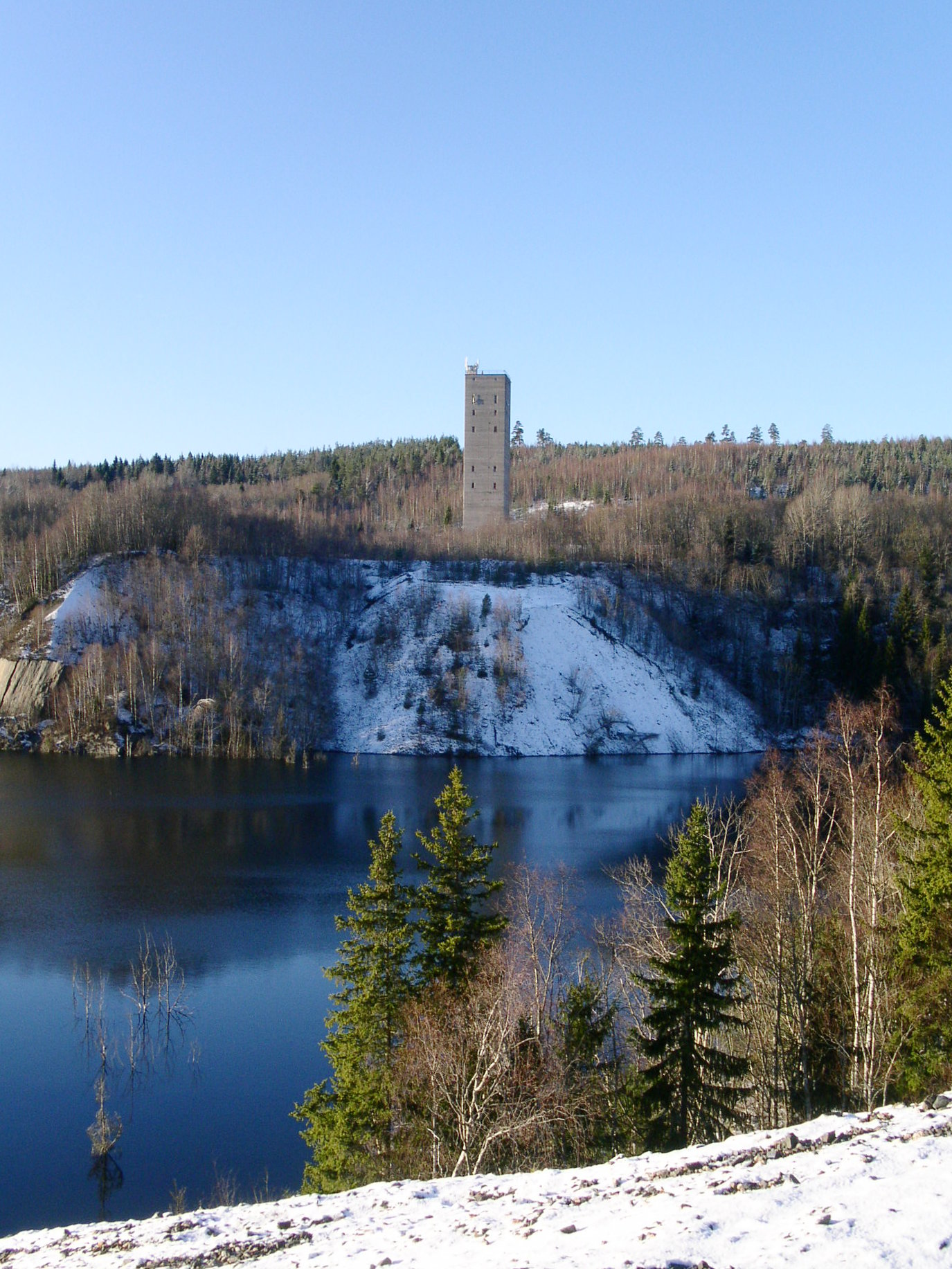 Grängesbergs gruva sedd från Norra tippen. Bilden tagen mot väster visar Risbergsfältets lave